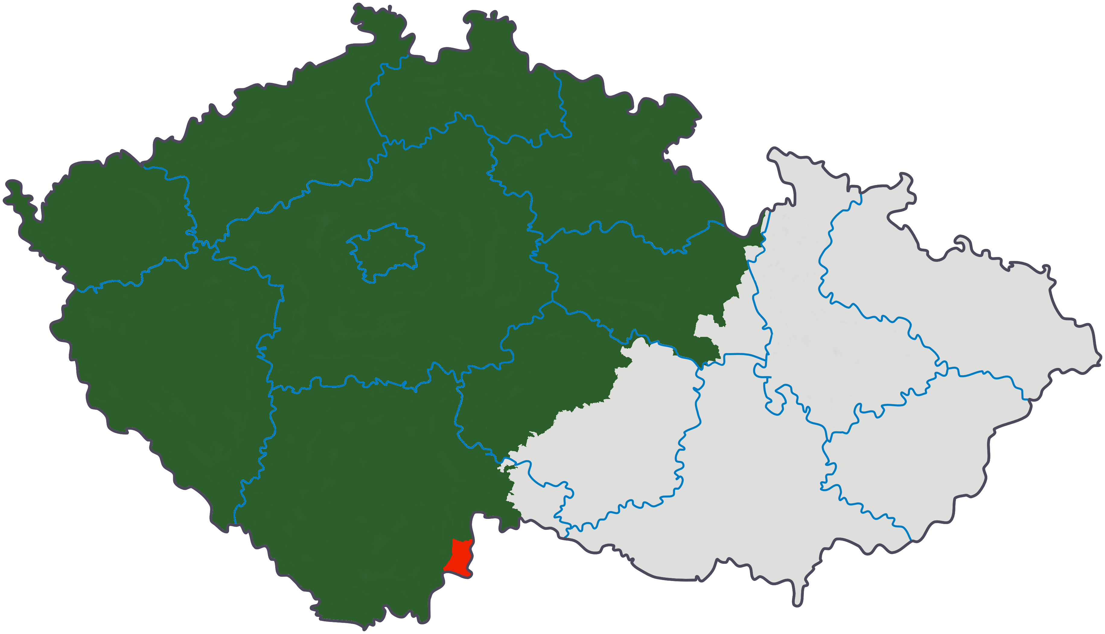 Zeleně je vyznačeno území Čech do 30. července 1920. Červeně je vyznačeno území tzv. Západního Vitorazska (dnes nazývané Vitorazsko) připojeného k Čechám od Rakouska dne 31. července 1920 (do té doby součást Dolních Rakous).